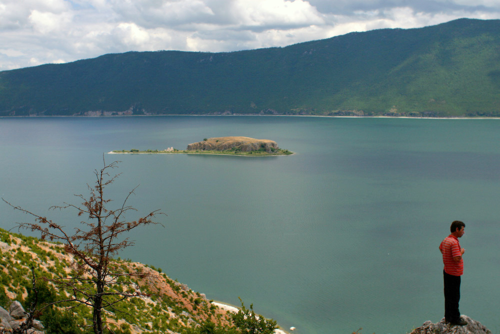 Lake Prespa, Albania